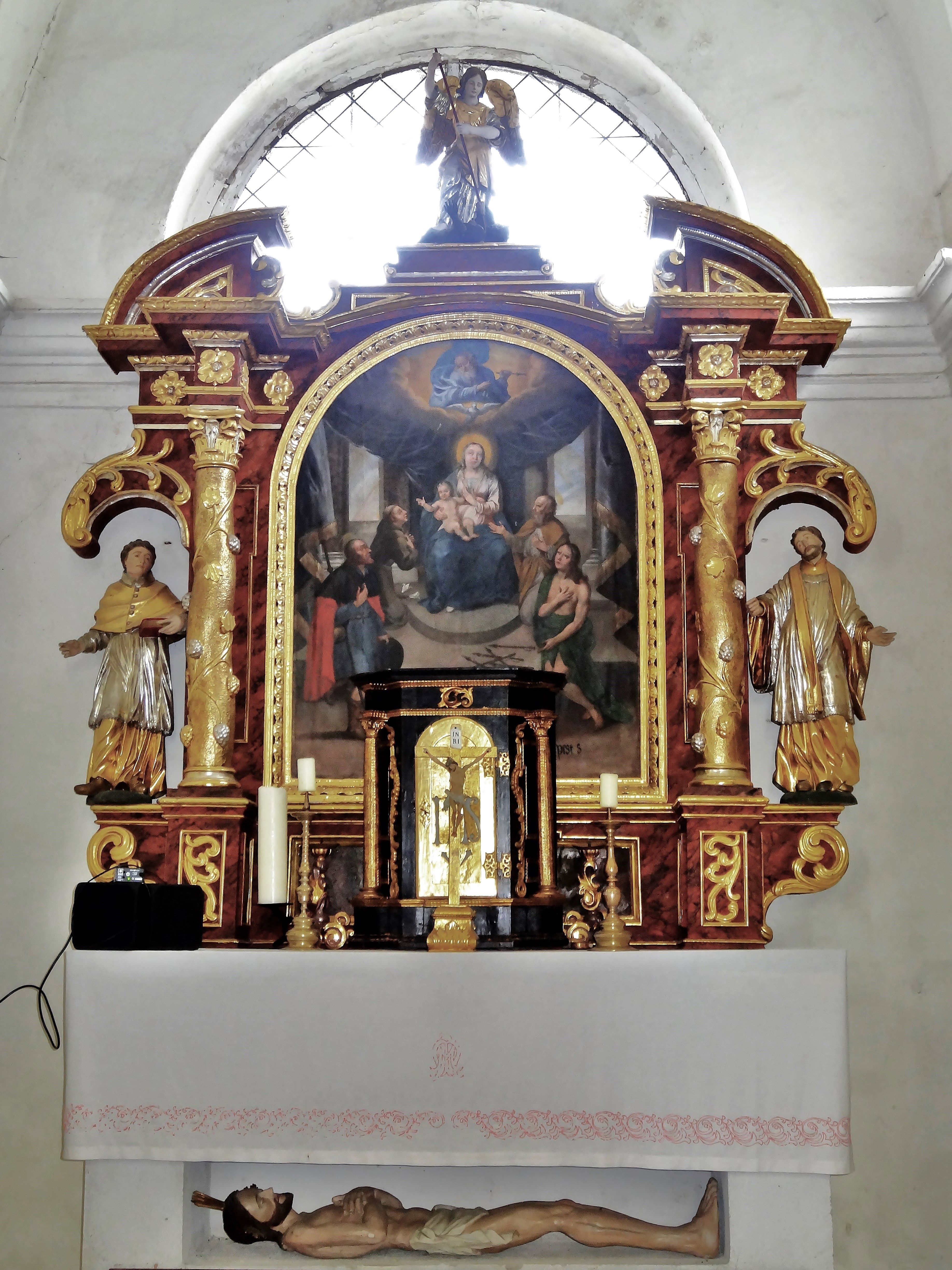 Kath. Filialkirche St. Sebastian, Launsdorf, Altar der Seitenkapelle mit Darstellung einer Sacra Conversazione